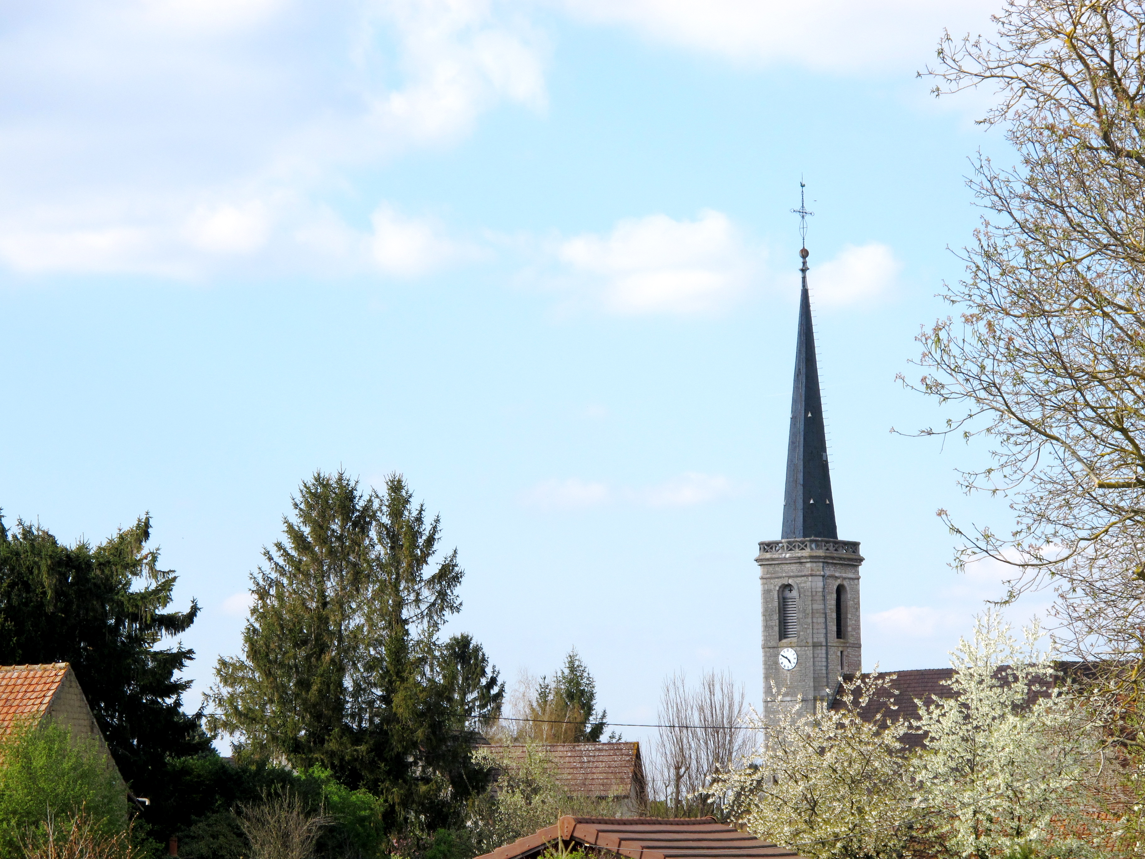 Village jurassien de la plaine de Dole. La flèche du clocher de l'église de Petit Noir domine la riche région agricole du Finage.